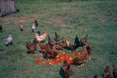 Free Range Chickens being fed